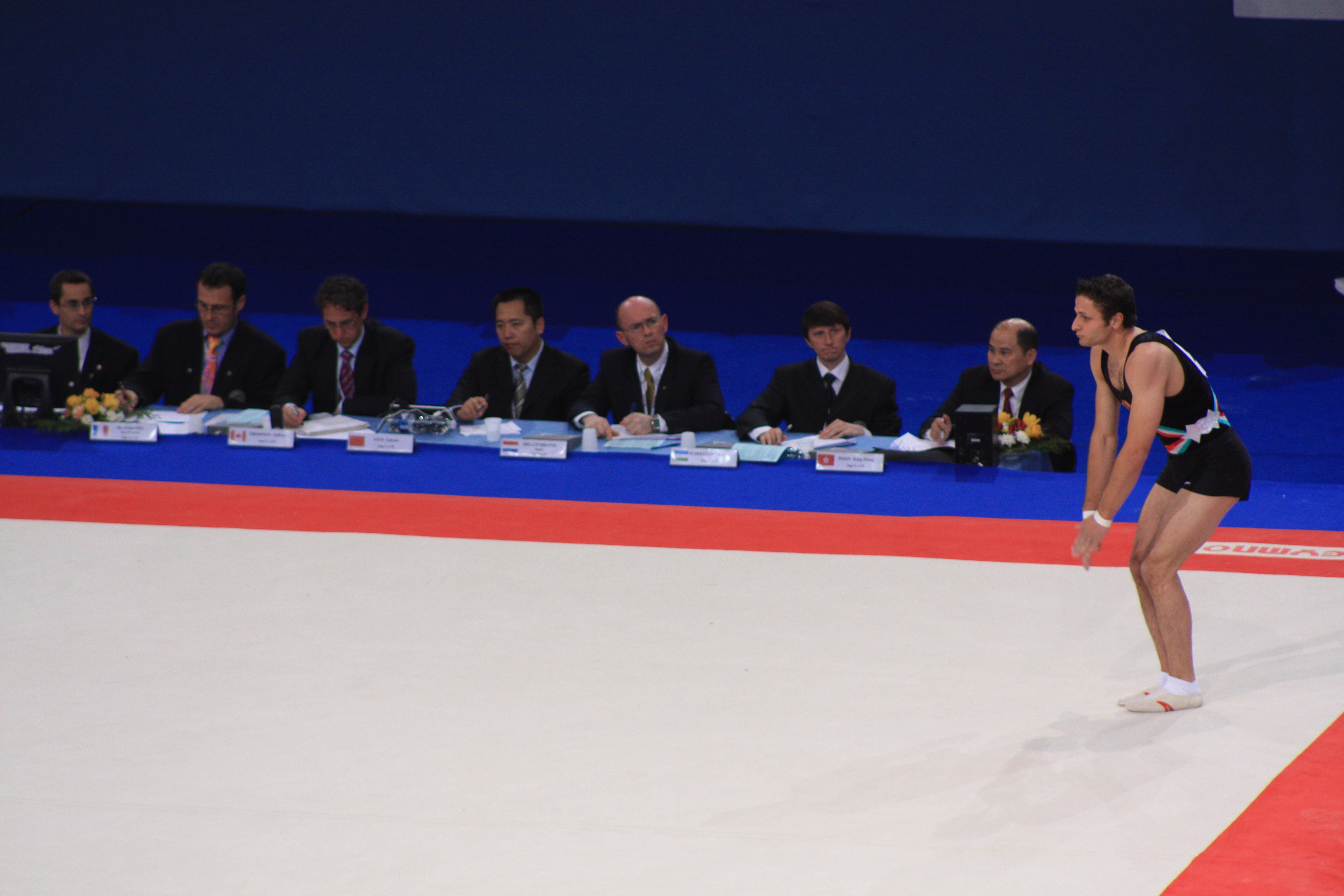 Jad Mazahreh passe en sol, en qualification des 17e Internationaux de France (2010).